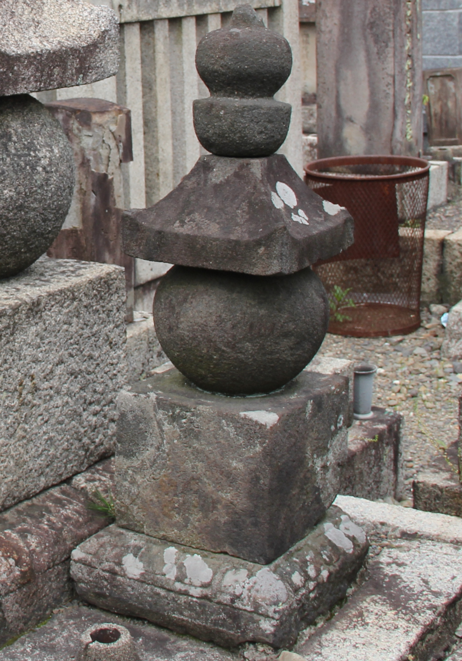 清浄華院墓地内にて（2011.06.15）